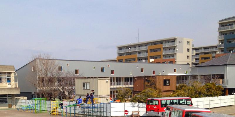 加藤学園幼稚園新園舎工事現場を2012年3月16日に加藤学園暁秀初等学校2階より撮影したもの。